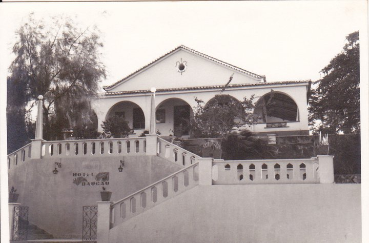 Baucau-Jun 70-A pousada.Sempre se diz "pousada" mas o certo é que lá estava escrito "Hotel de Baucau"